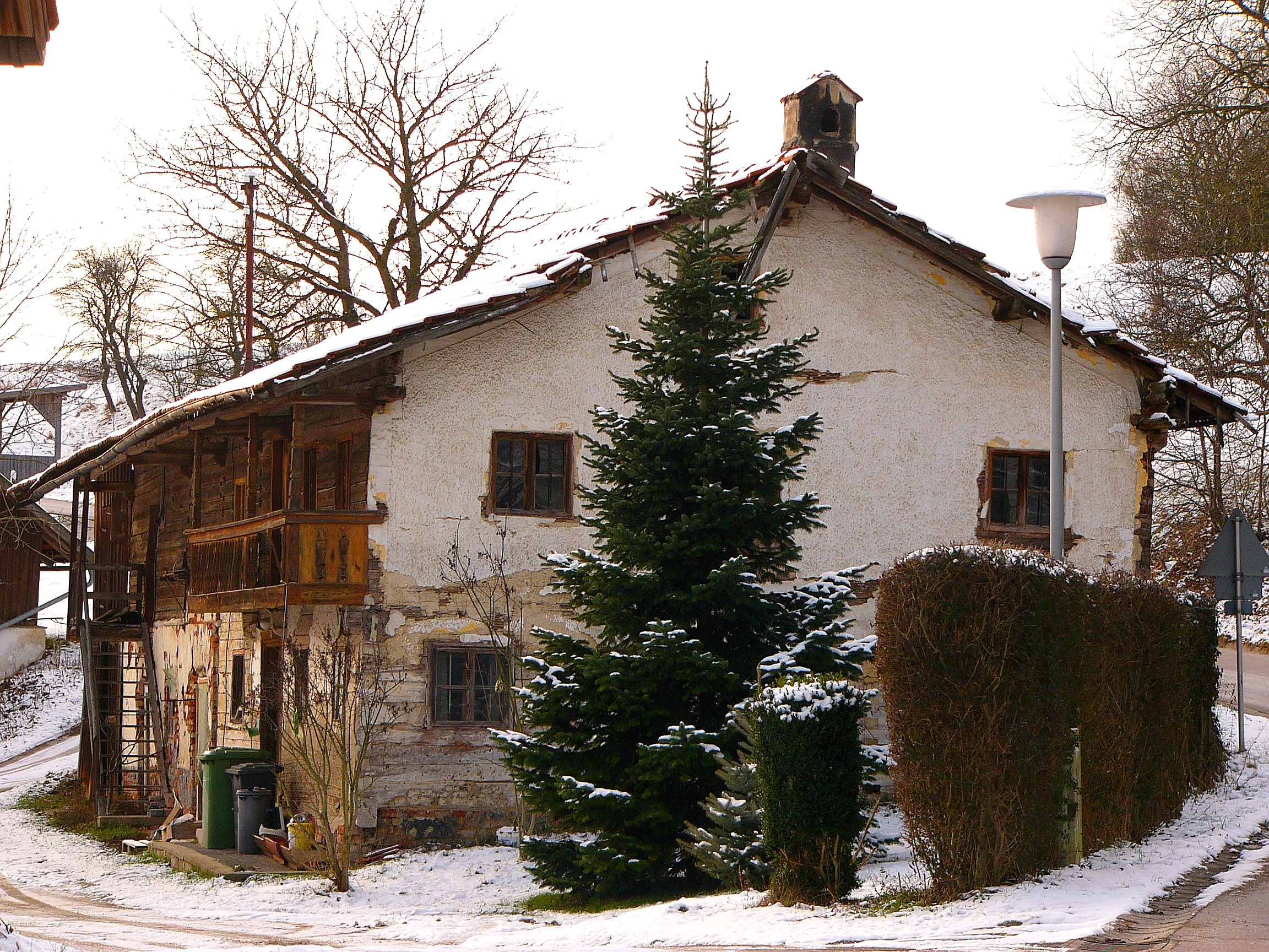 Wohnstallhaus; zweigeschossiges Gebäude mit Flachsatteldach, Blockbau mit Traufschrot, Stallteil teilweise Ziegelstein, Anfang 19. Jahrhundert. This is a photograph of an architectural monument.